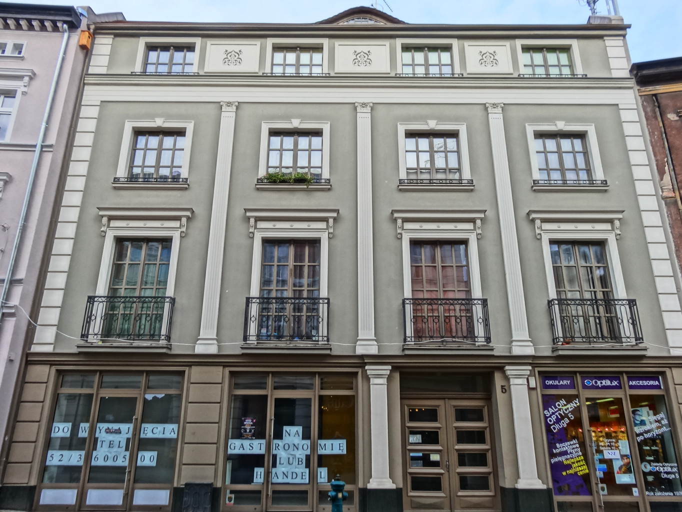 Kamienica przy ul. Długiej 5 w Bydgoszczy (1925-1930)